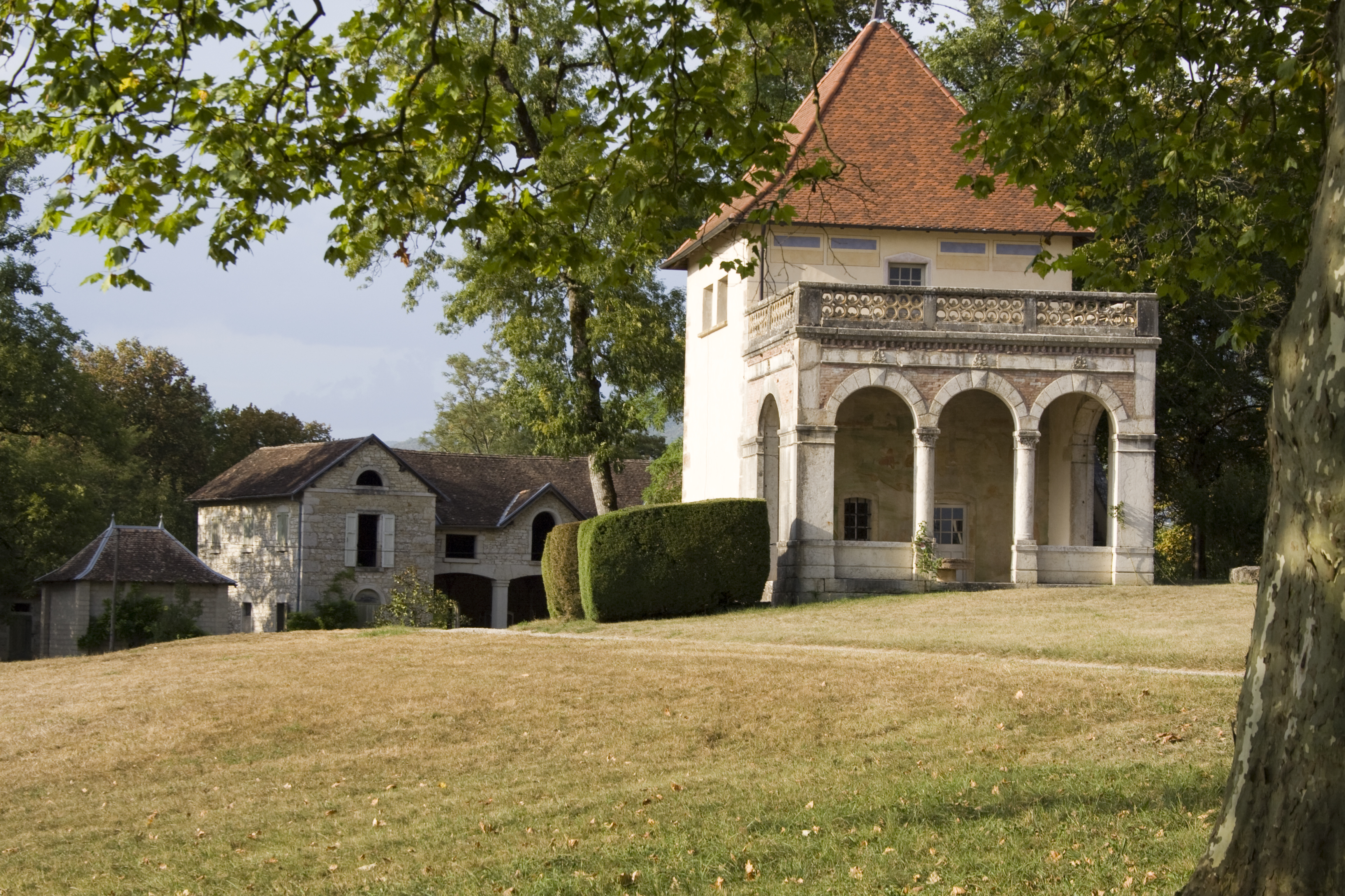 Le Château de Brangues, propriété de Paul Claudel, près de Morestel (Isère)